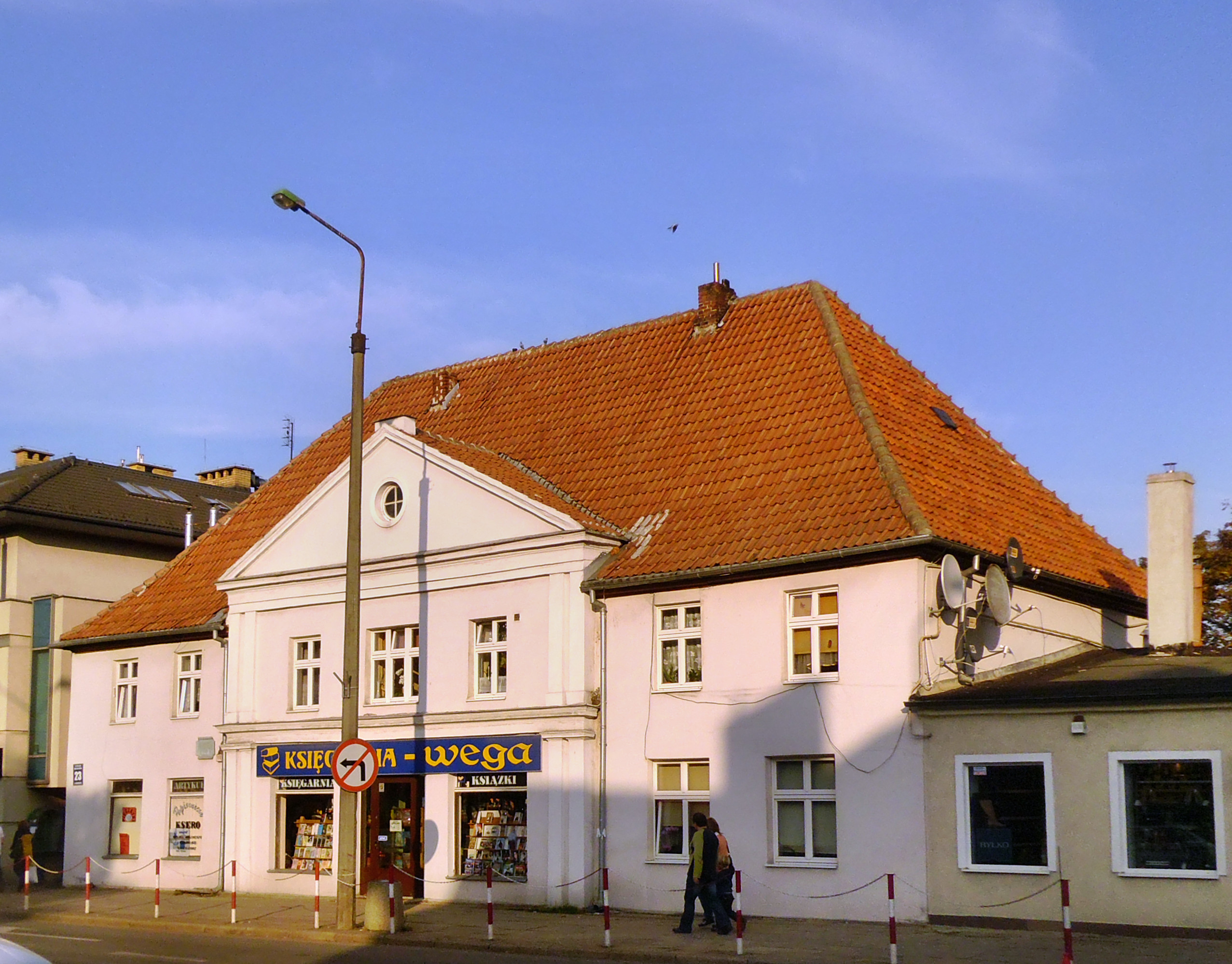 dom, widok od ul. Grunwaldzkiej ul Grunwaldzka 23 Pruszcz Gdański